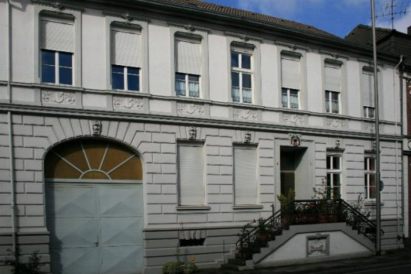 Denkmal Nr. 152 in Willich-Anrath